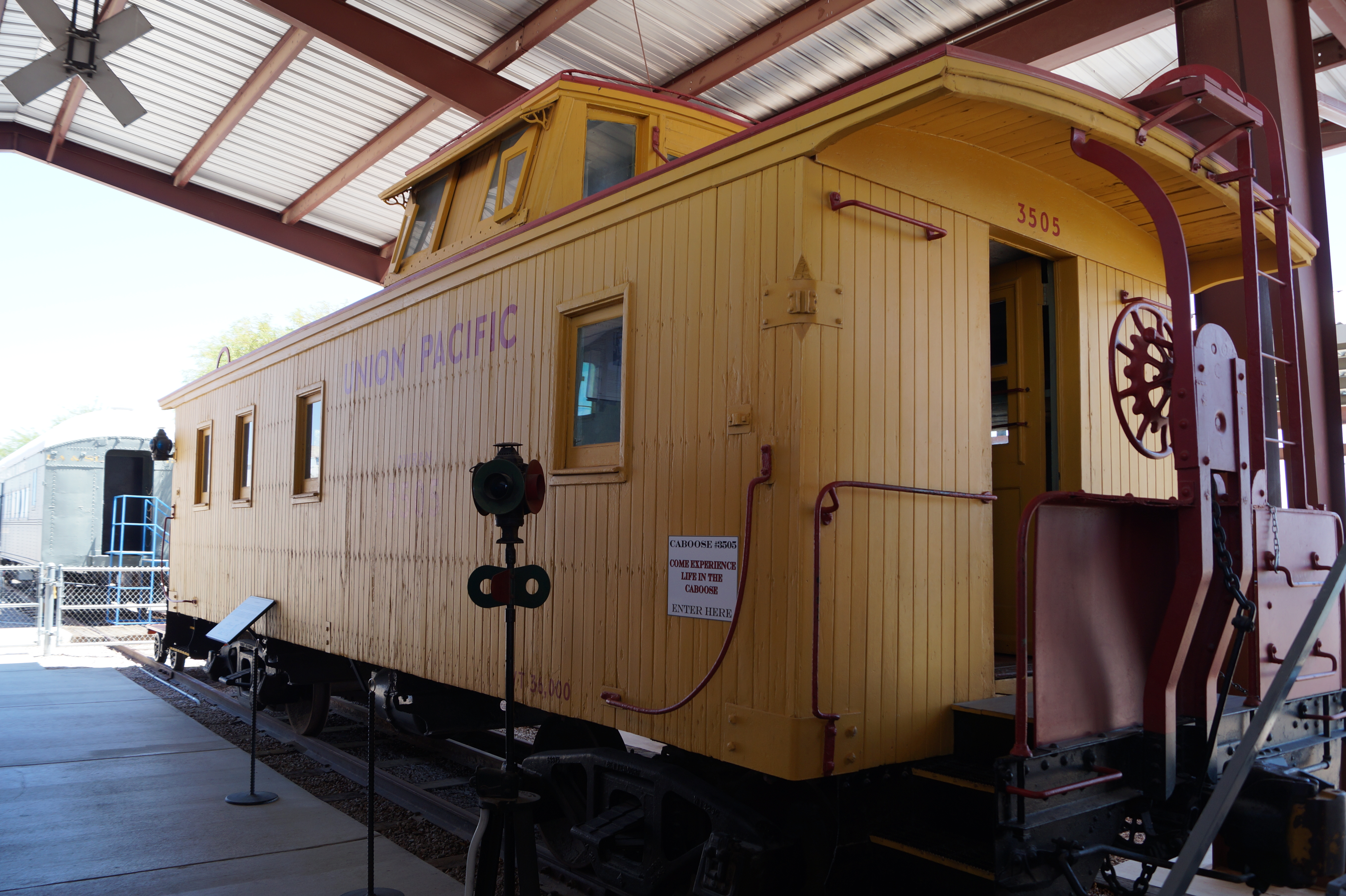 The Nevada State Railroad Museum which is an agency of the Nevada Department of Cultural Affairs. It is located at Yucca Street on the tracks of the historic Union Pacific Railroad branch Henderson-Boulder City near the former Boulder City Railroad Yards where the Hoover Dam construction equipment was unloaded in the 1930s.